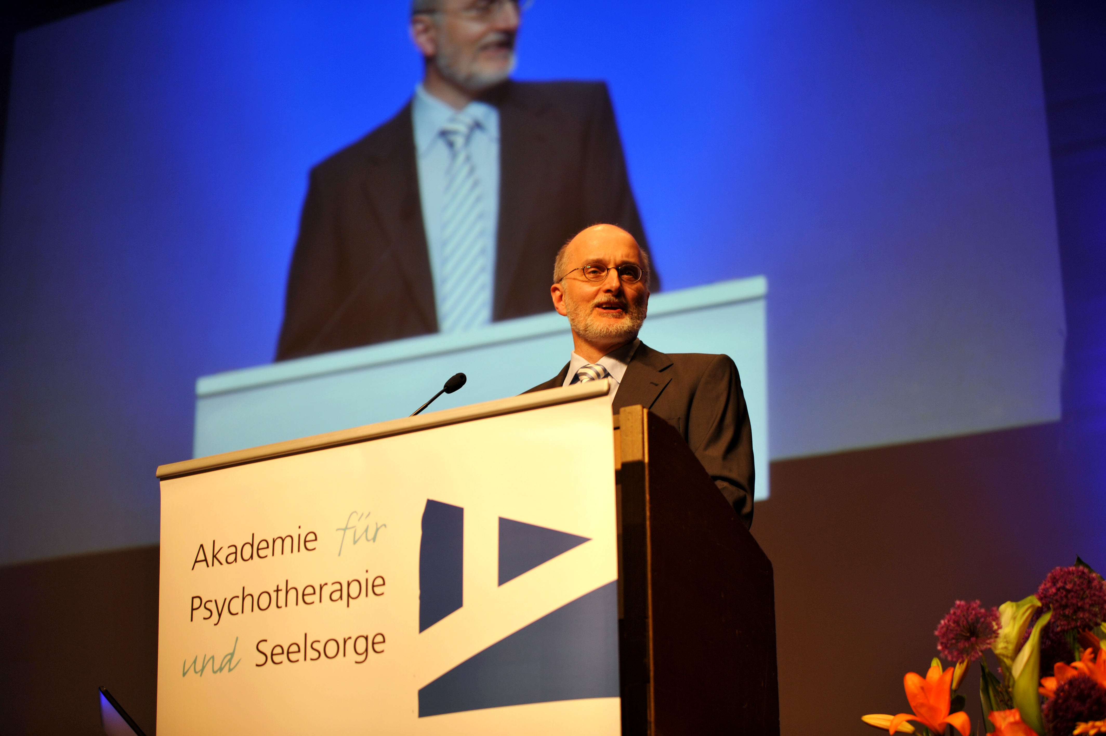 Martin Grabe, , Psychotherapeut und Vorsitzender der Akademie für Psychotherapie und Seelsorge (APS), bei der Eröffnung des 7. Internationalen APS-Kongresses in Würzburg